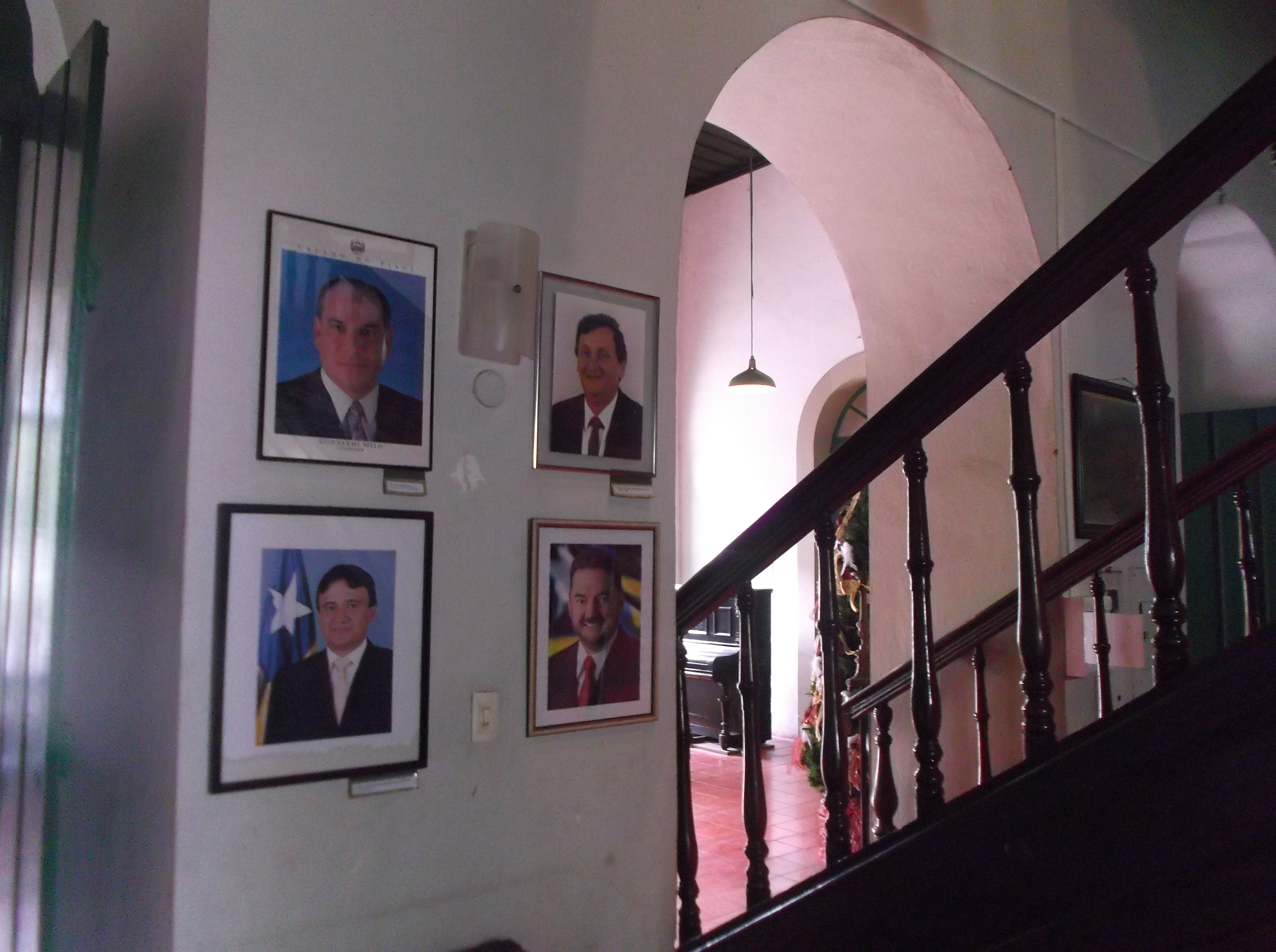 Vista parcial interna do Museu do Piauí